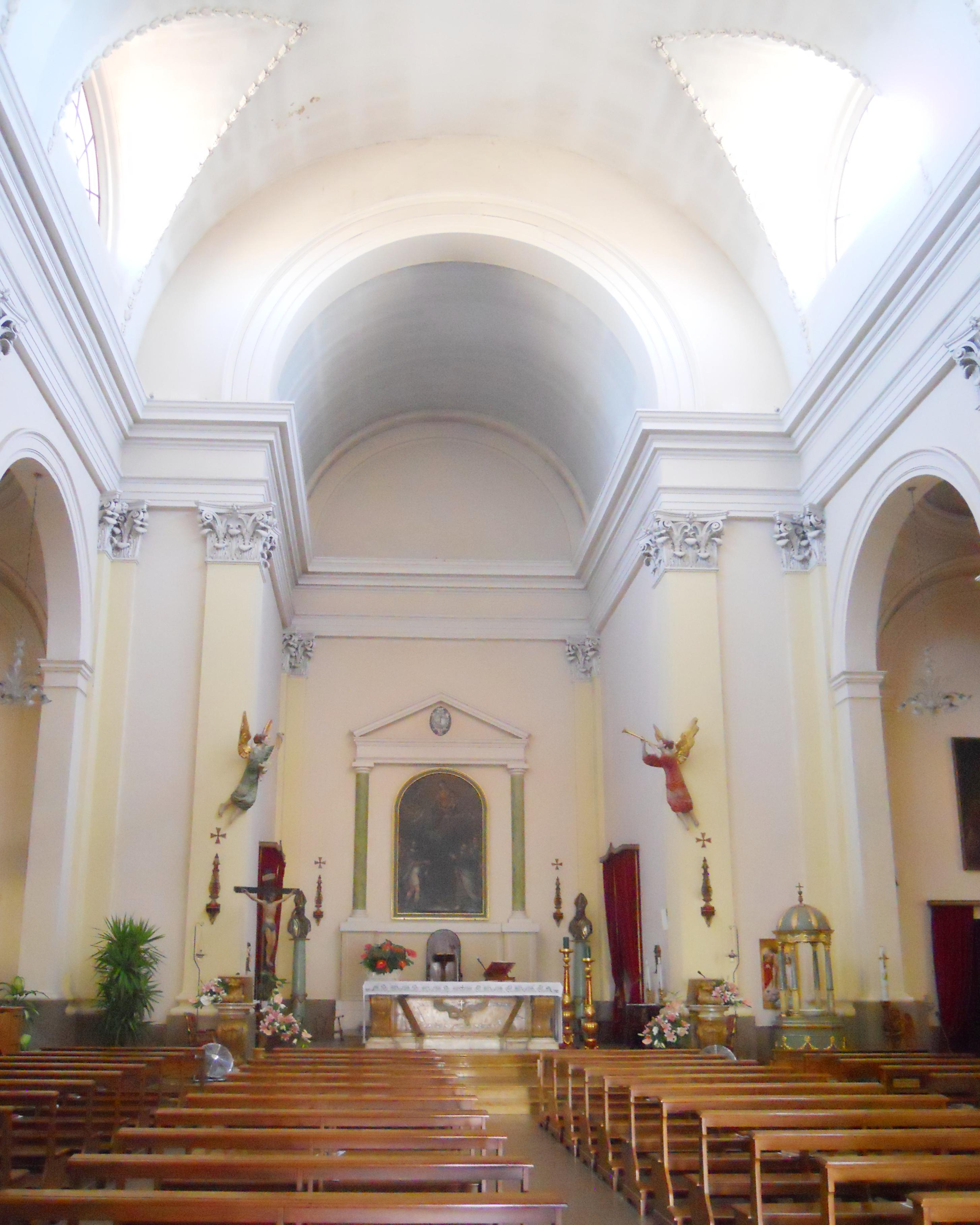 L'interno neoclassico a tre navate della chiesa di San Rocco a Ravenna